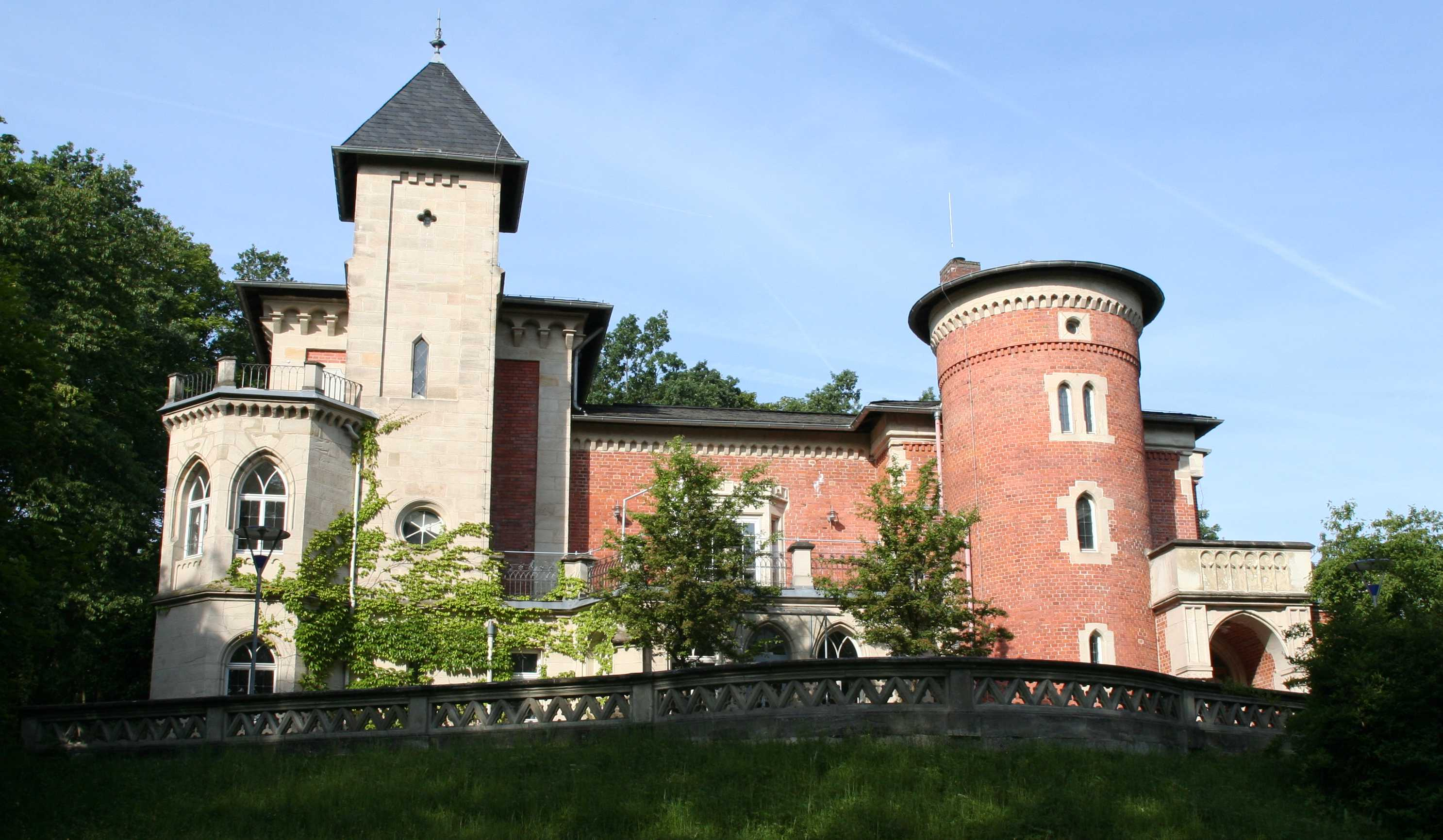 Schloss Falkenegg in Coburg-Neuses bei Rodacher Straße